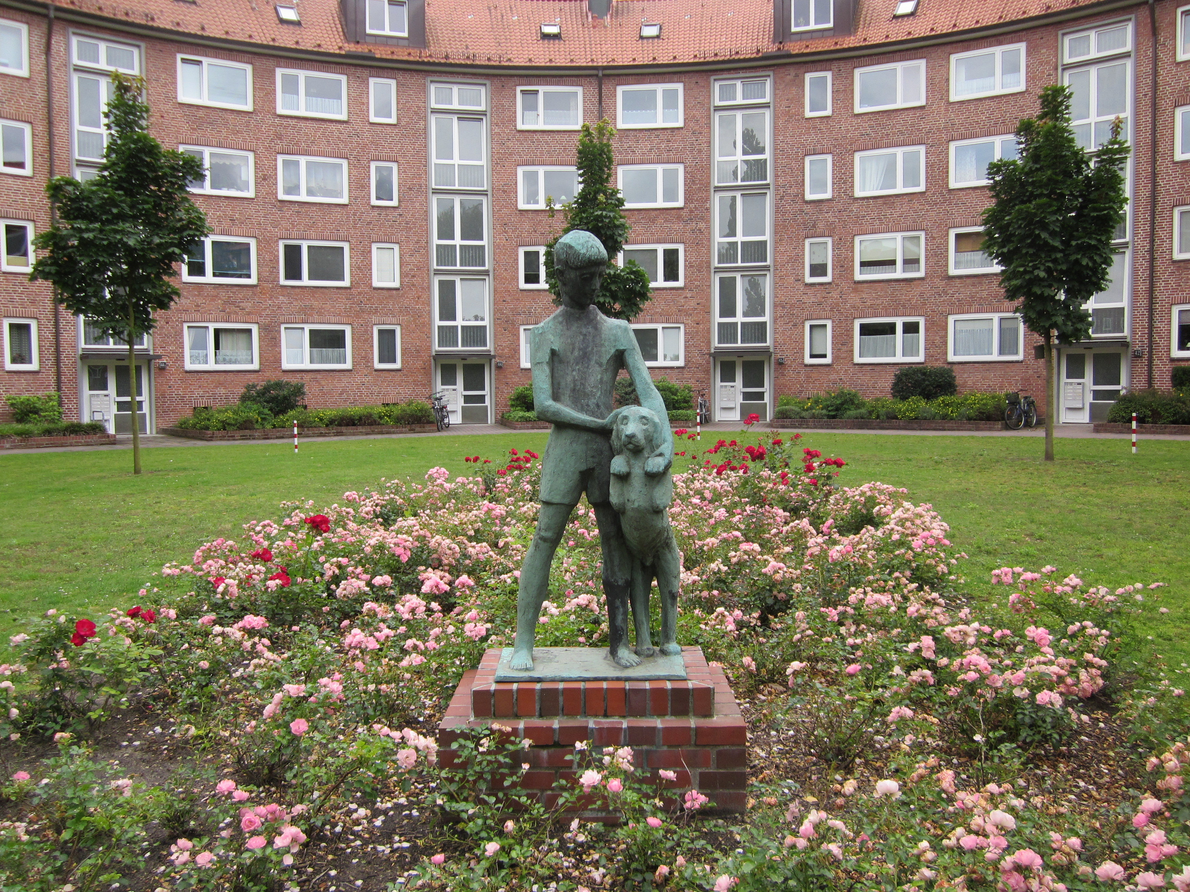 Skulptur eines Mannes mit einem Hund vor der Wohnanlage Richardstraße 42/44 in Uhlenhorst.